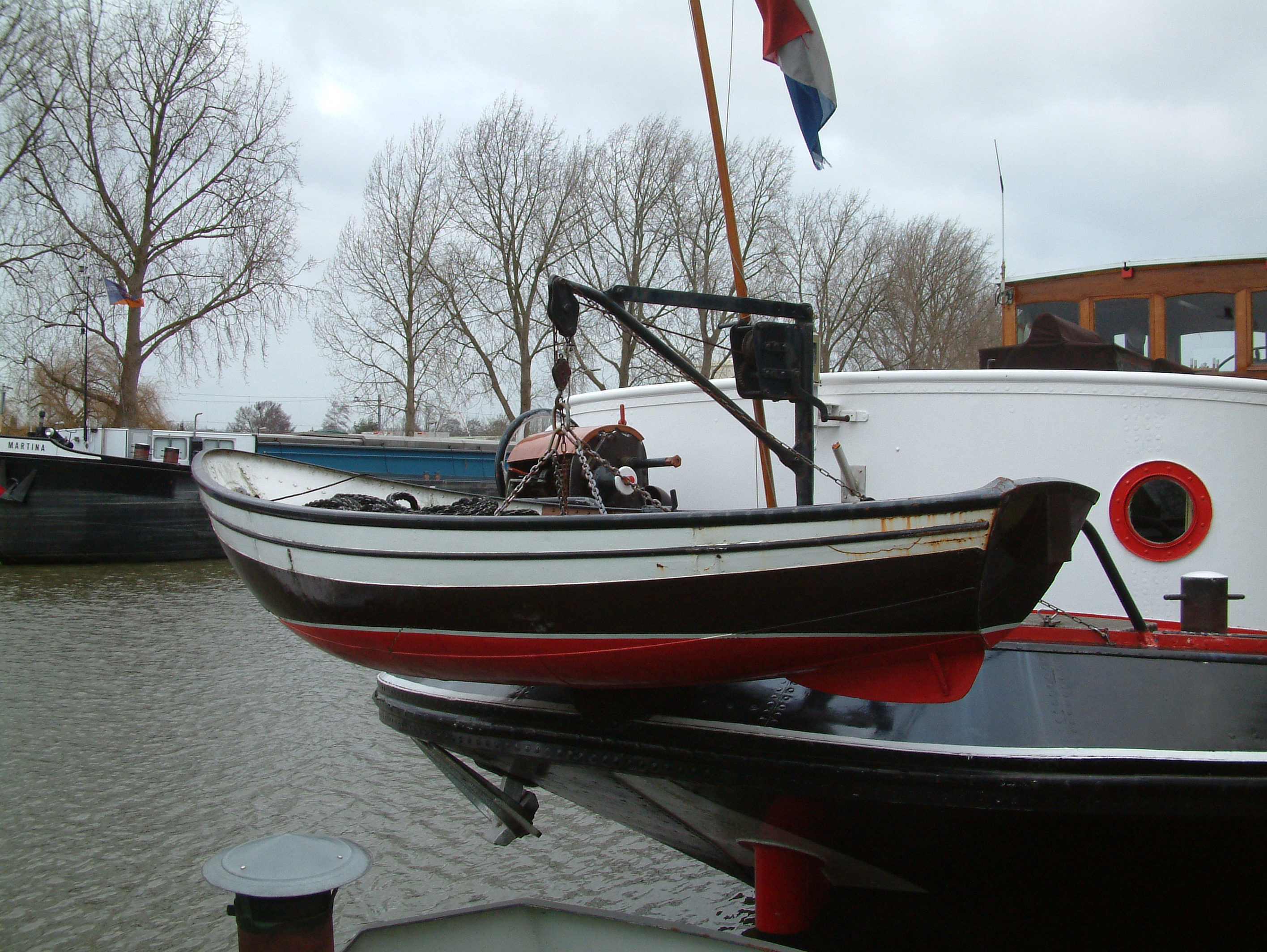 De bijboot van de TERRA NOVA, het schip van de LVBHB